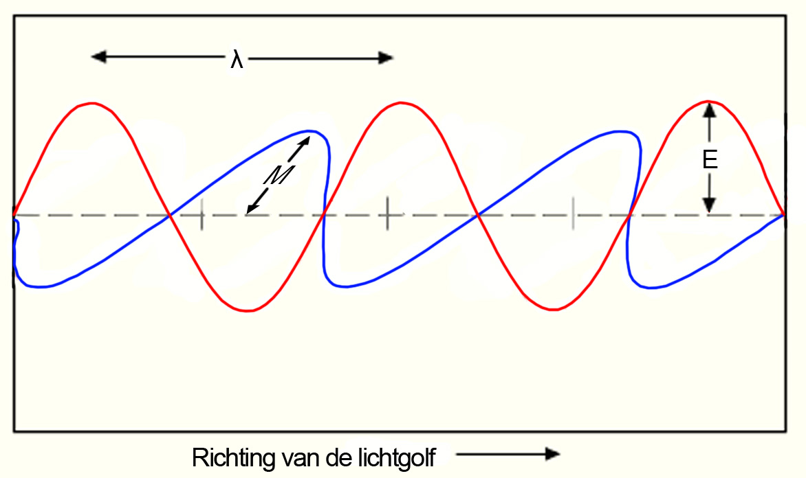 Zelf gemaakt Diagram van een elektromagnetische golf, laat de richting van de oscillaties in de elektrische en magnetische velden zien